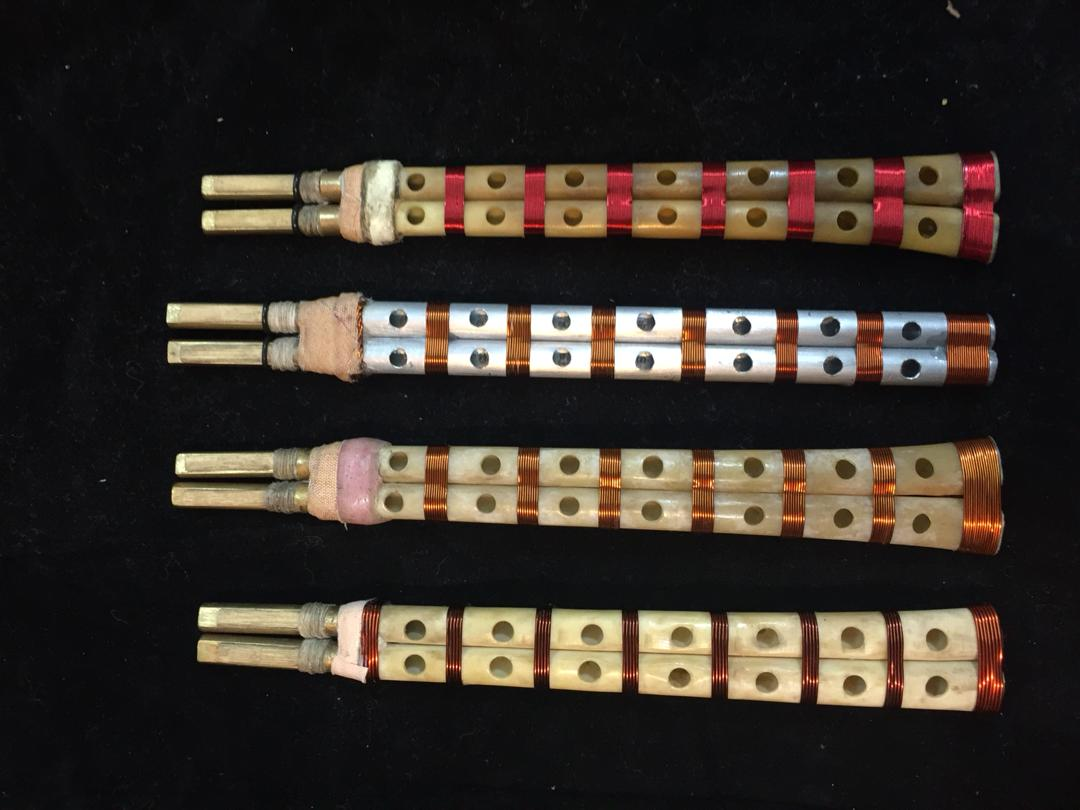 انواع قوشمه